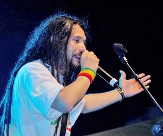 Foto de Quique Neira en vivo